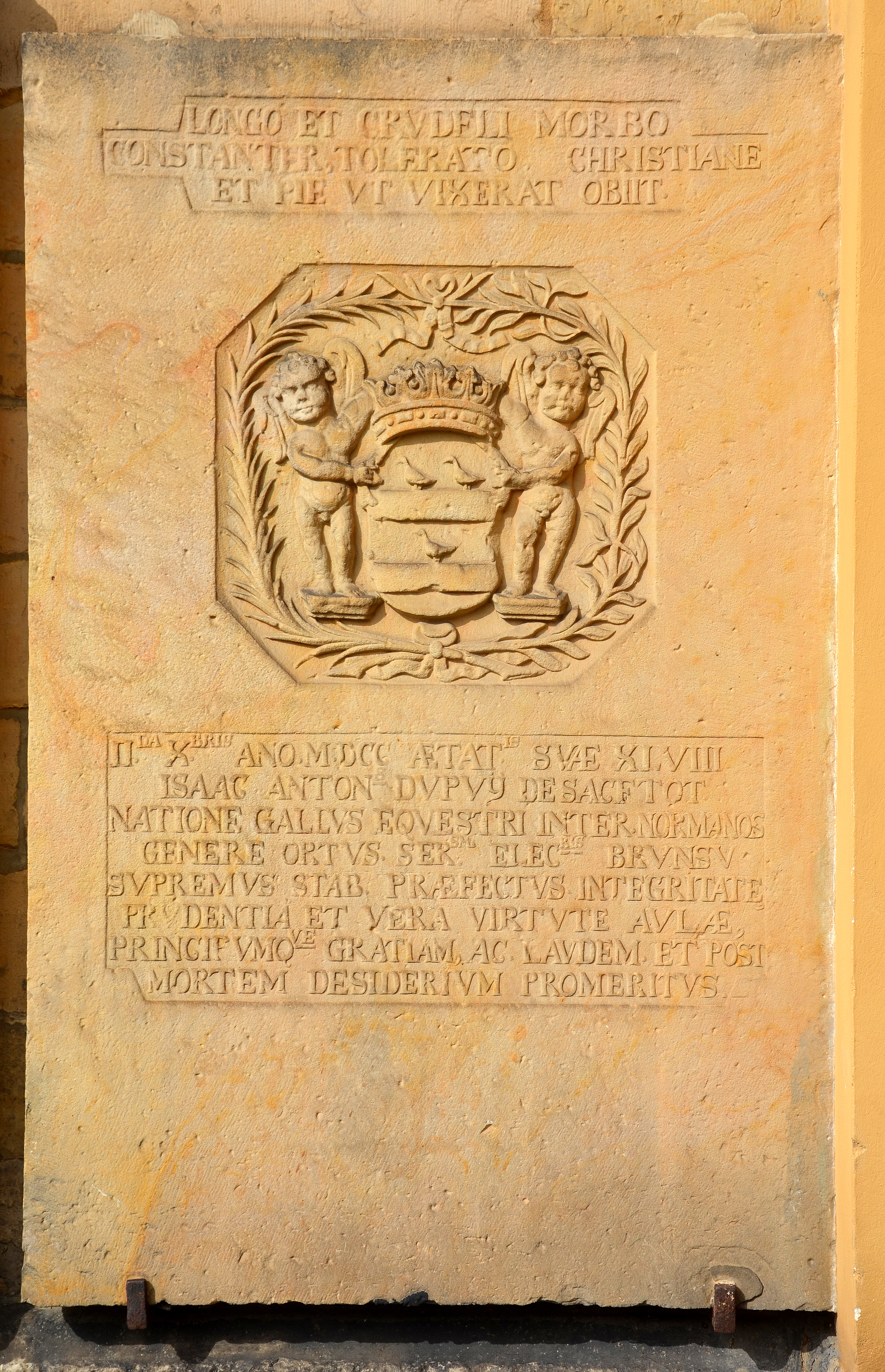 Ehemalige Grabplatte aus der Neustädter Hof- und Stadtkirche St. Johannis in Hannover im heutigen Stadtteil Calenberger Neustadt. Der aus Frankreich geflohene Hugenotten und kurfürstlich-hannoverschen Oberstallmeister Isaac Anton de Sansdouville Dupuis de Sacetôt (* 1662 in der Normandie; † 2. Dezember 1700 in Hannover) war maßgeblicher Mitbegründer der hannoverschen Französisch-reformierten Gemeinde, wurde in den Adelsstand erhoben und nach seinem Tode in der Kirche unter dieser Grabplatte bestattet. Nach den Zerstörungen der Kirche durch die Luftangriffe auf Hannover im Zweiten Weltkrieg wurde die Grabplatte neben vielen anderen an der Aussenwand der Kirche angebracht, am Querschiff zum Neustädter Markt ...